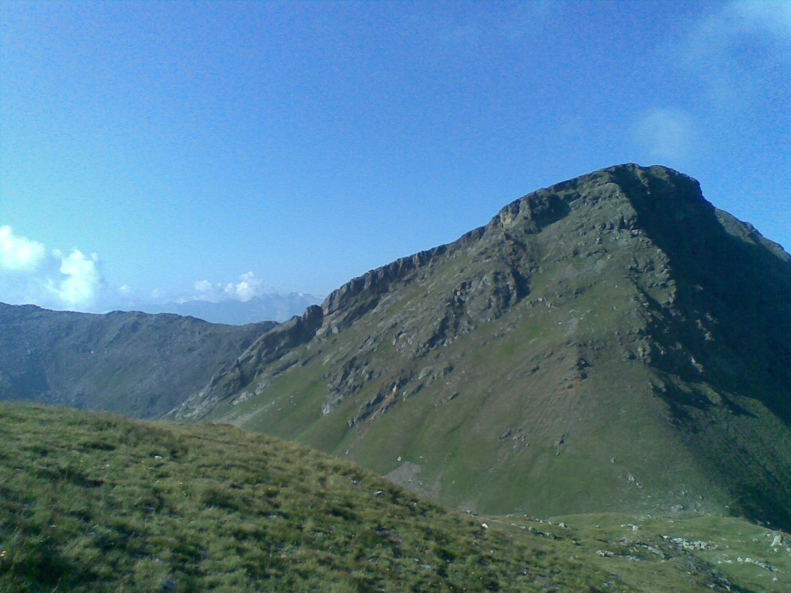 Castel Pagan da cima Tuatti in una giornata di bel tempo